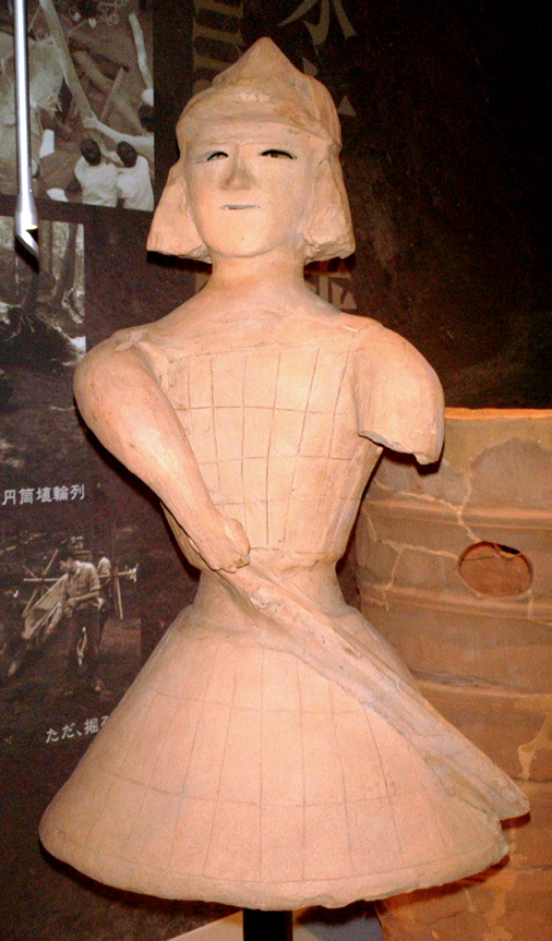 Funazuka Kofun Haniwa Soldier